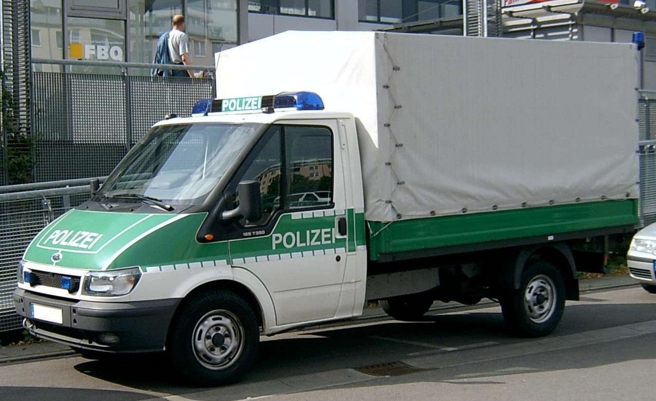 Fahrzeug der deutschen Polizei. Präsentiert in Frankfurt (Oder) am Rande des Oderturmlaufes 2006